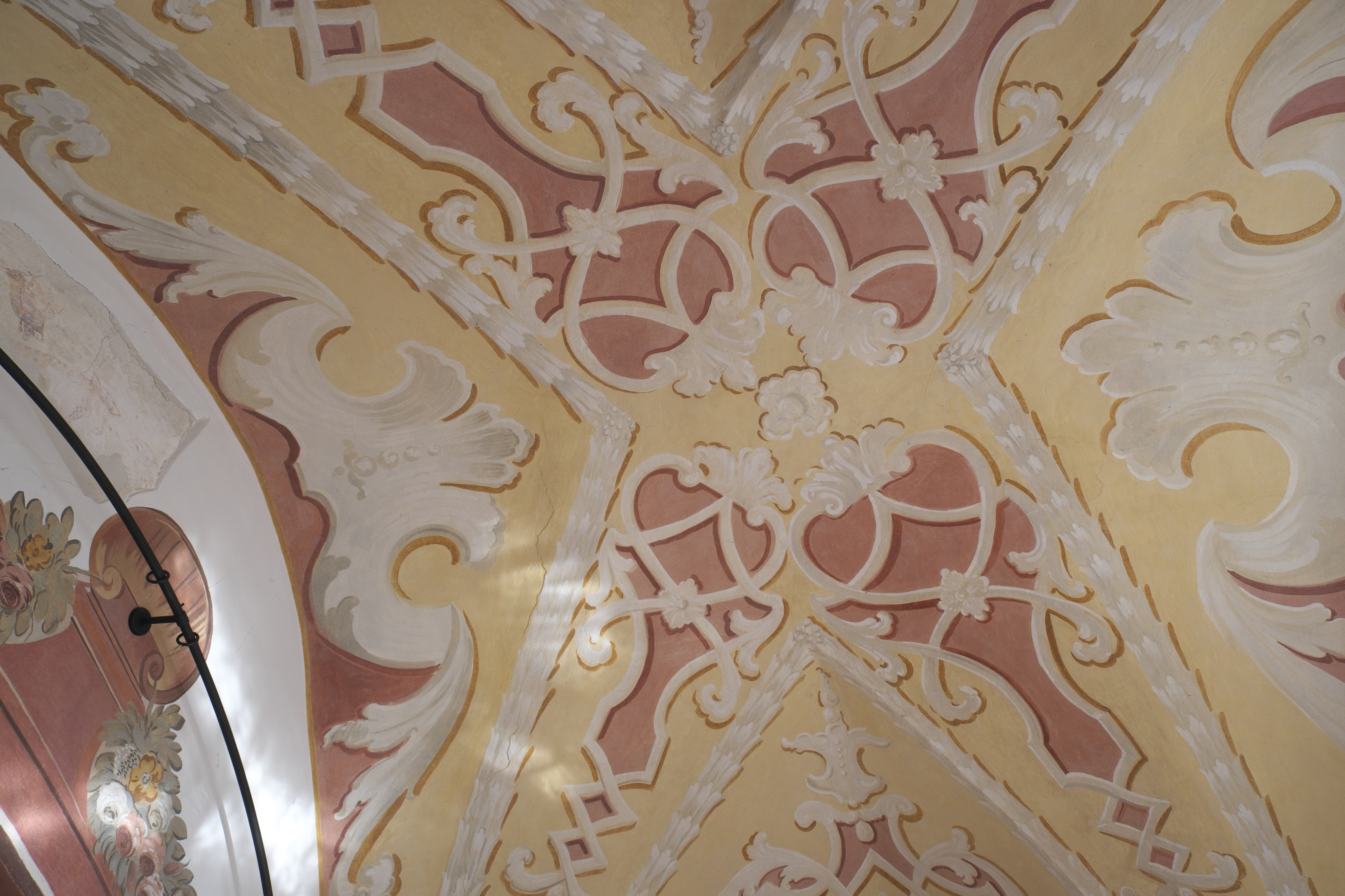 Katholische Pfarrkirche Mariä Heimsuchung in Gosseltshausen (Wolnzach) im Landkreis Pfaffenhofen an der Ilm (Bayern/Deutschland), Deckenfresken der Seitenkapelle